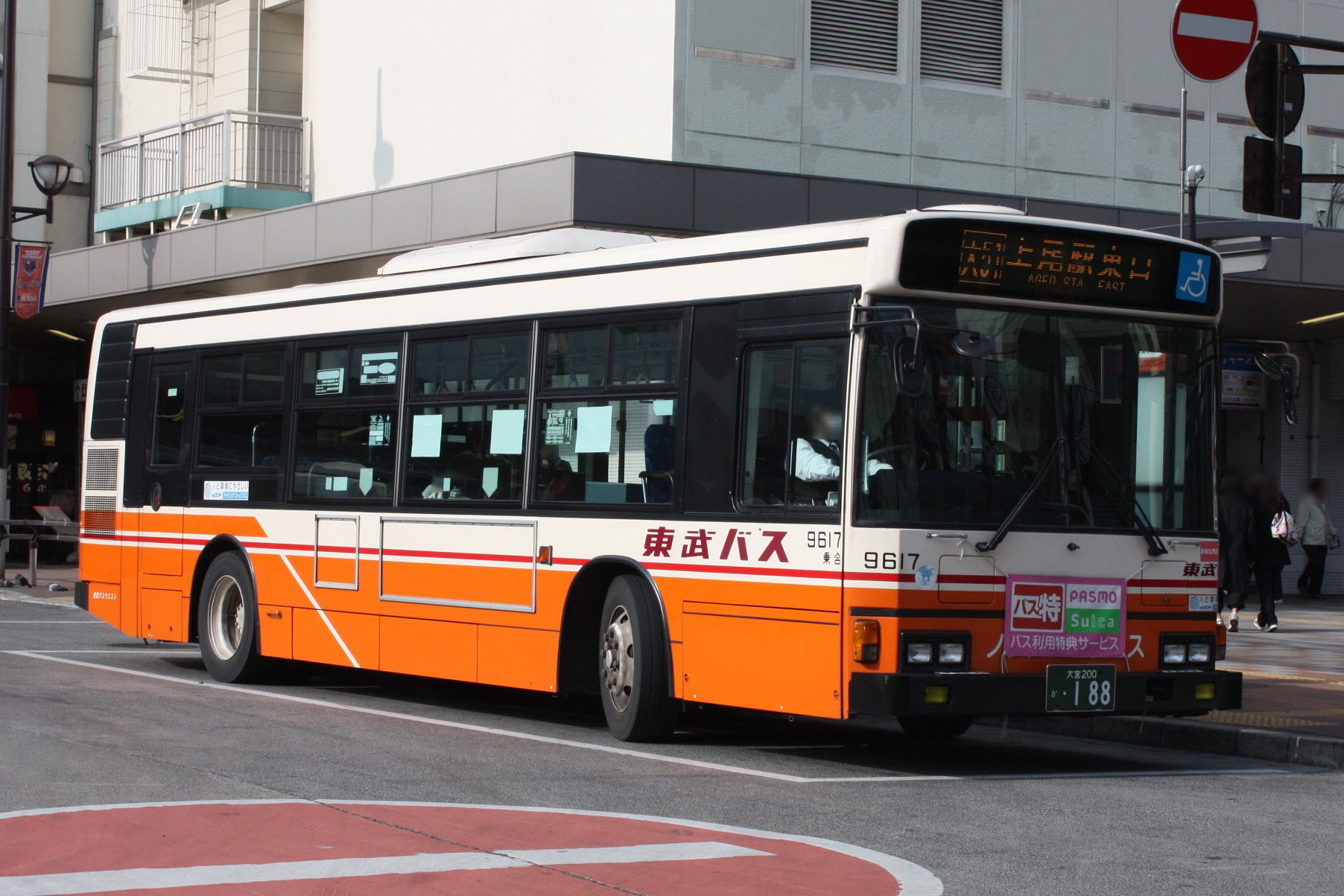 東武バスウエスト大宮営業事務所 車番:9617 KC-HU2PMCE 大宮駅東口にて